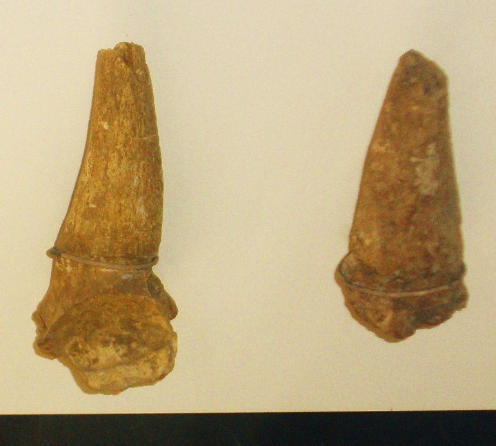 Fossil of Eotragus, an extinct mammal -- Took the photo at Natural History Museum, London